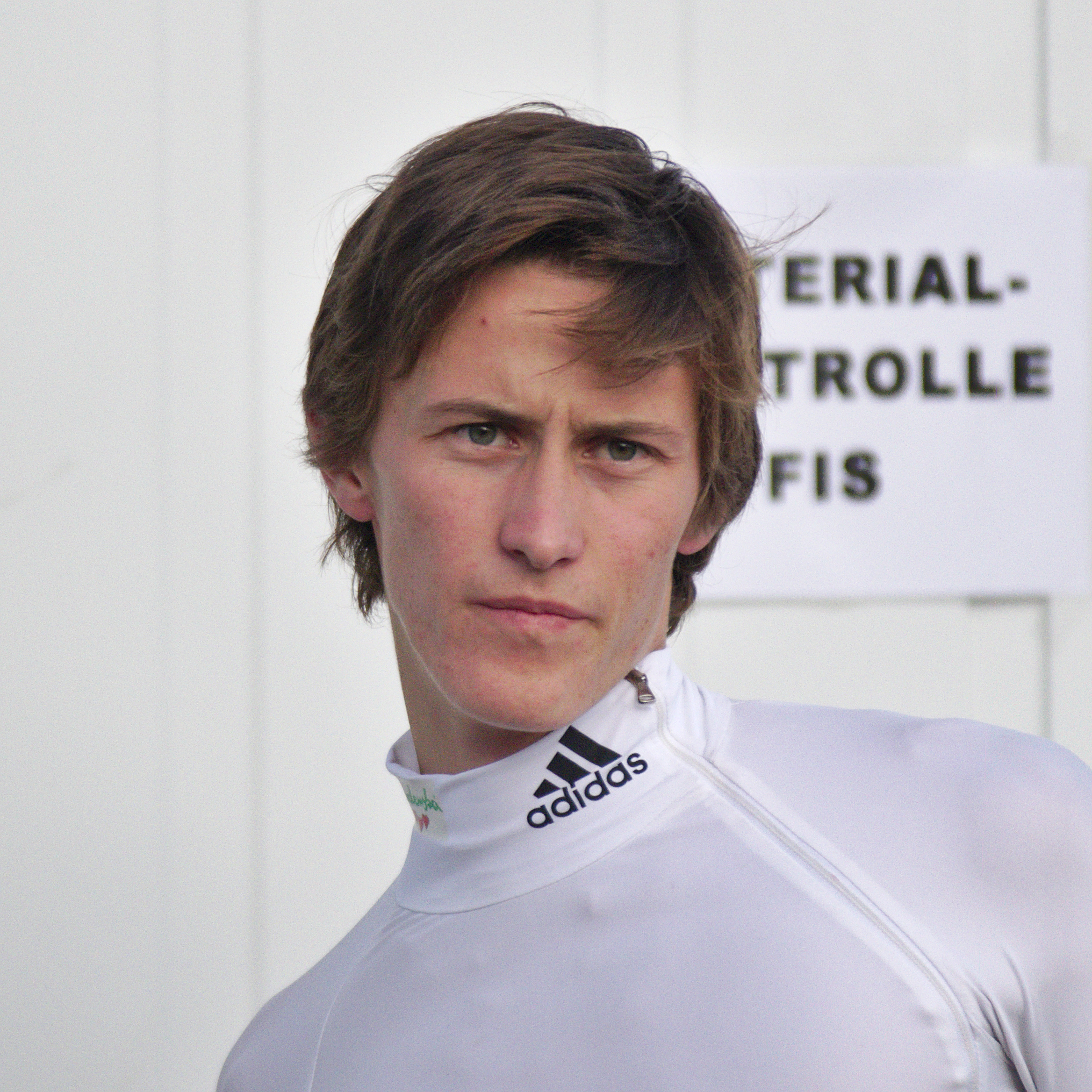 FIS Sommer Grand Prix 2014 - 20140809 - Peter Prevc